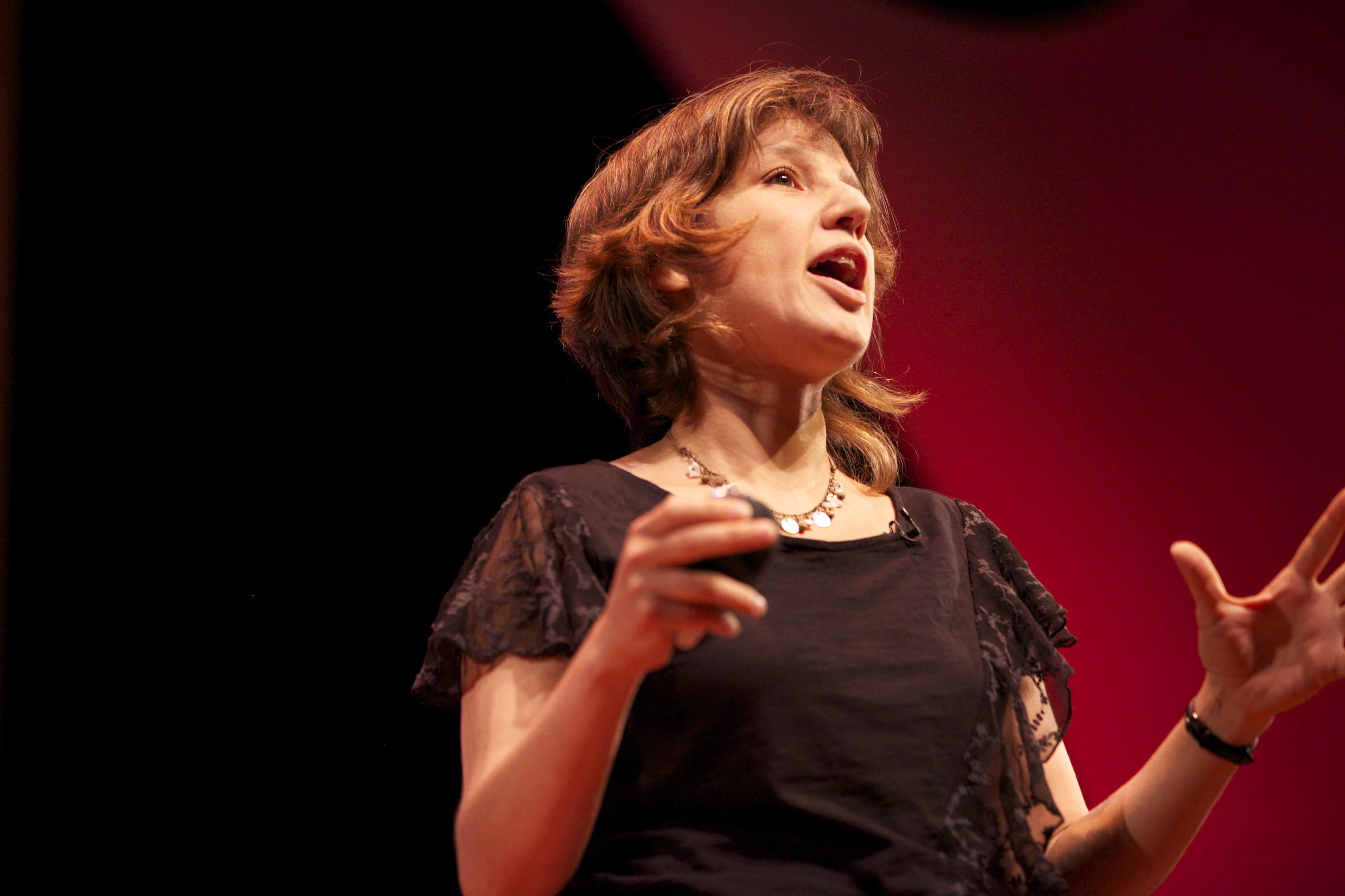 Zeynep Tufekci 2